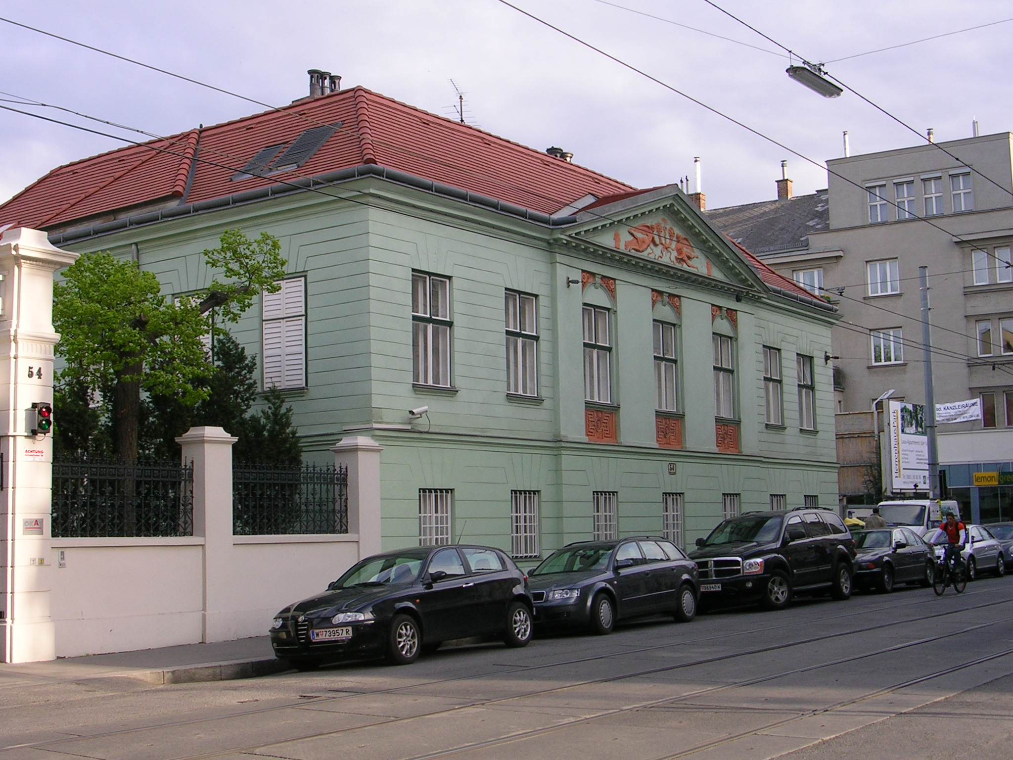 Die Herrenhaus-Kellerei in der Döblinger Hauptstraße.